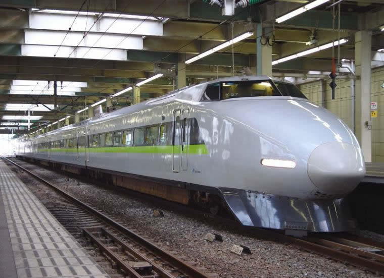 フランス語版からコピー